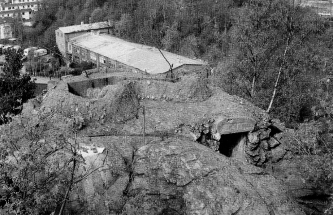 Ett av Finnbergets värn innan rivningen. I bakgrunden syns byggnader vid Finnboda varv